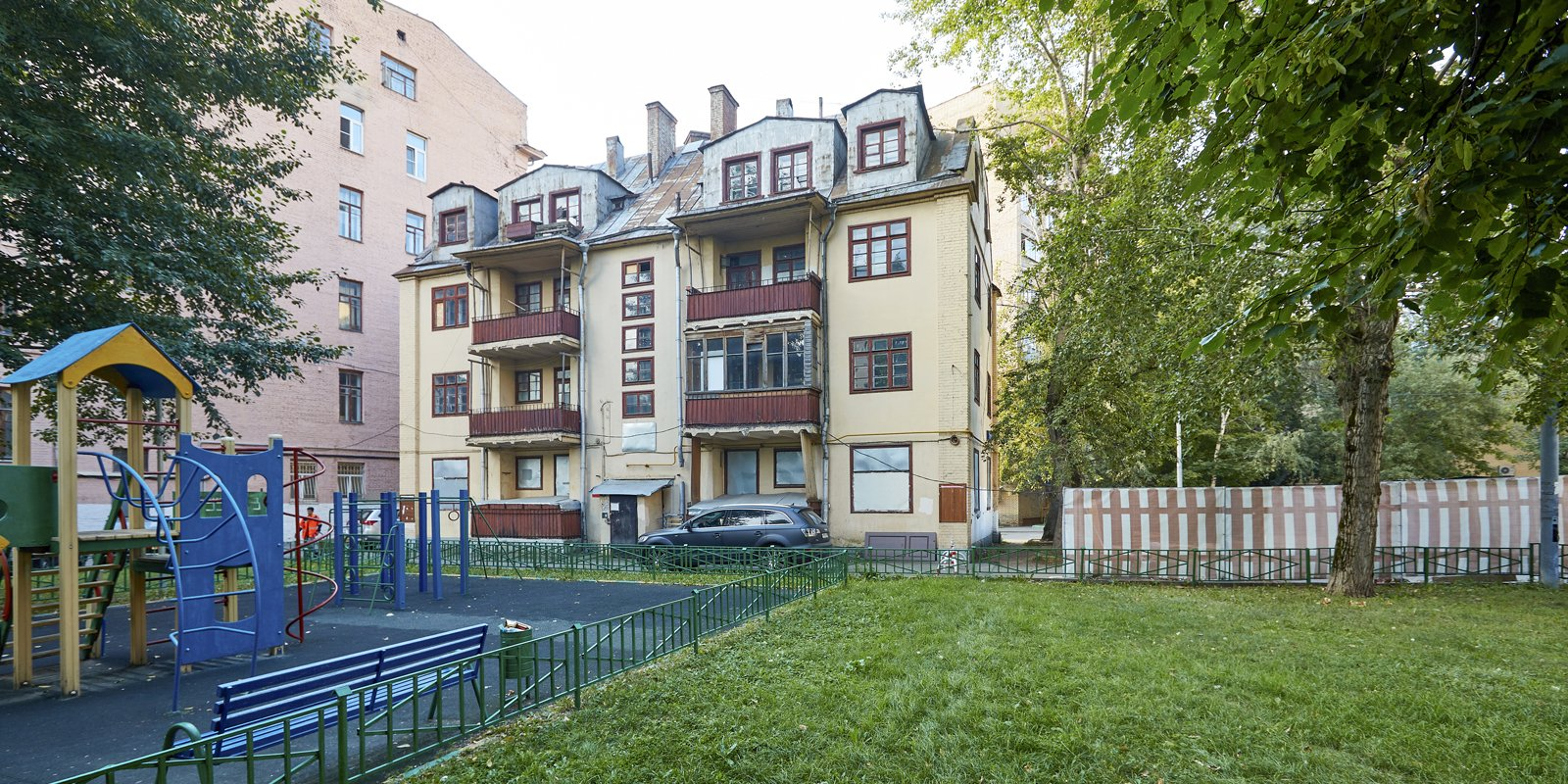 Жилой дом рабочего товарищества «Трудкоопстрой», памятник конструктивизма 1920-х, арх-р Вильгельм Циммер